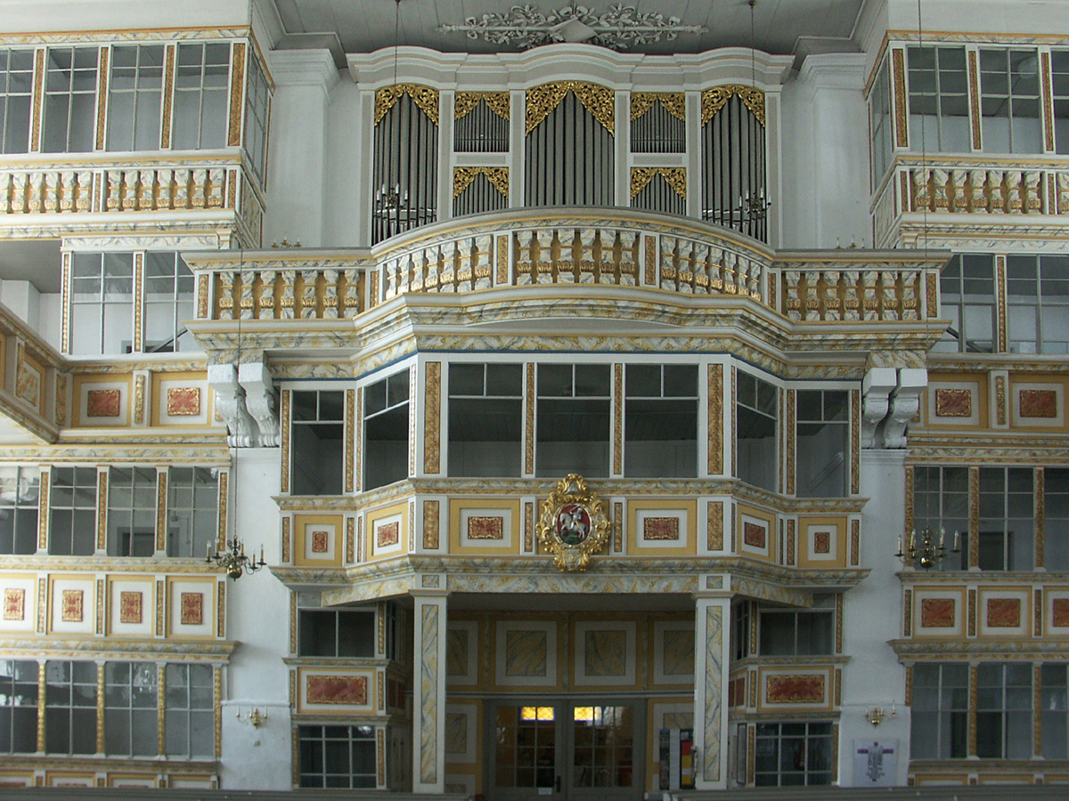 St. Georgenkirche Schwarzenberg/Erzg.: Galerien und Orgel